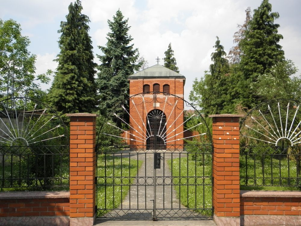 Kapelica Sv. Marije, Višnjevac. Svibanj, 2011.